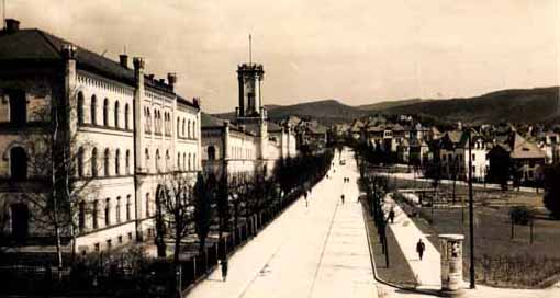 Große Kaserne in Reichenberg